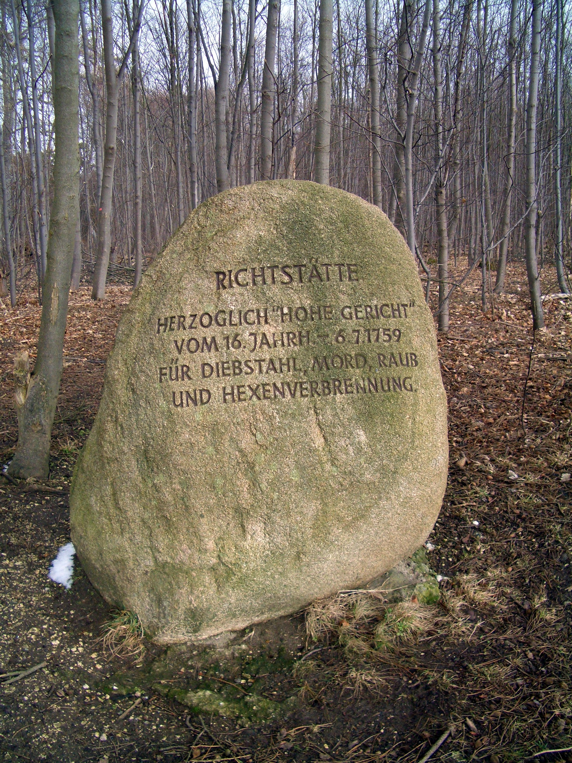 Gedenkstein an der Richtstätte Lechlumer Holz im ehemaligen Fürstentum Braunschweig-Wolfenbüttel, 2010